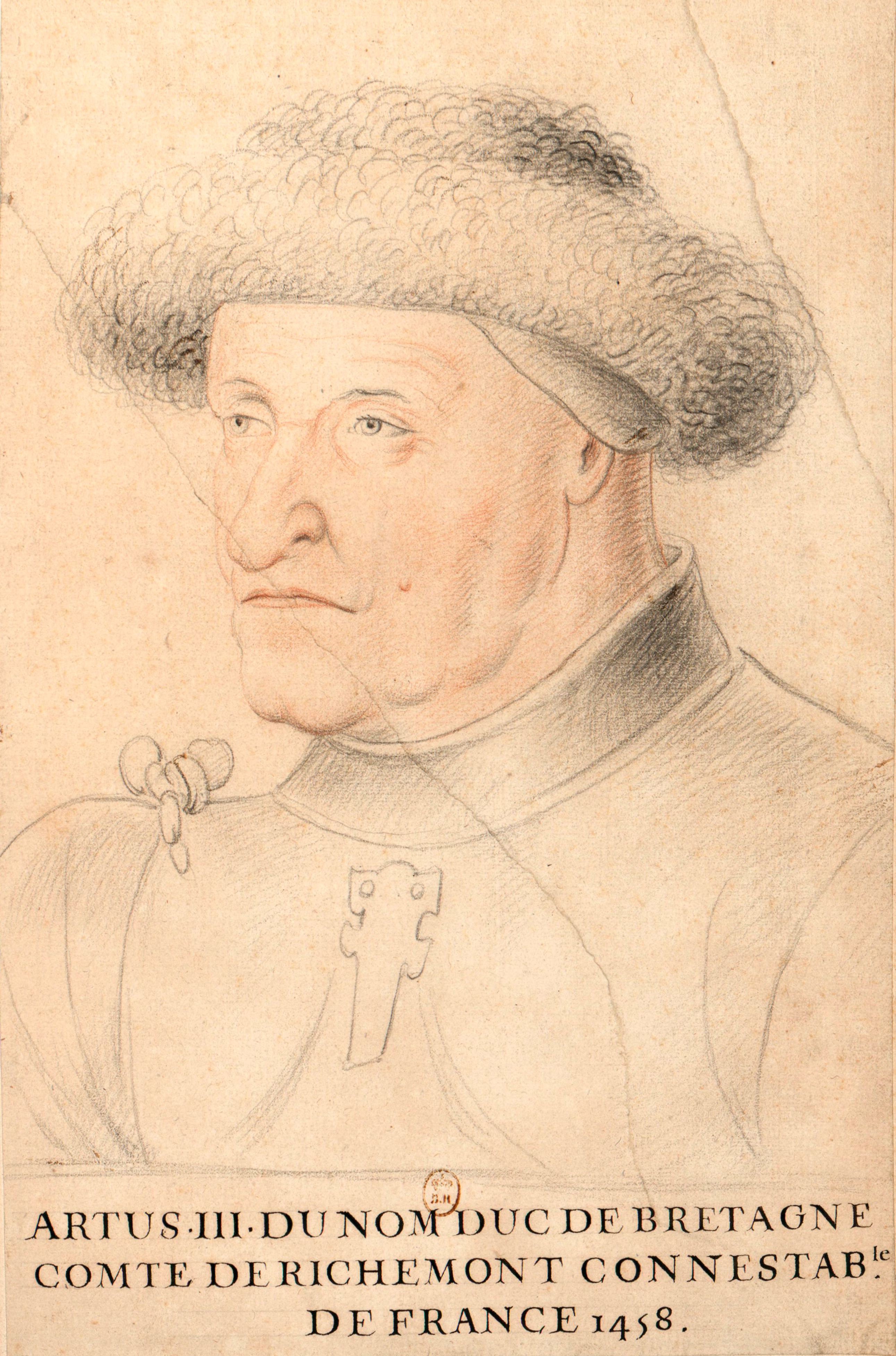 cote cliché : RC-B-08758 / légende : Portrait d'homme en harnais de guerre, avec chapeau de fourrure "Artus III du nom, duc de Bretagne..." Arthur III duc de Bretagne dit le connétable de Richemont / département : Estampes et photographie / cote du document : RESERVE OA-14-FOL / collection ou fonds : Gaignières 570 / partie de : Recueil de costumes / folio, pagination : Folio 48 / auteur(s) : Non identifié / catégorie : Dessins